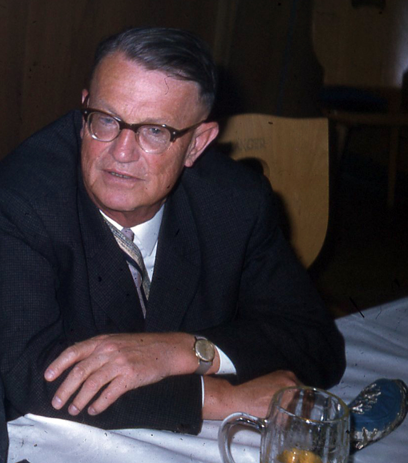 Fotografie von Robert Paschke